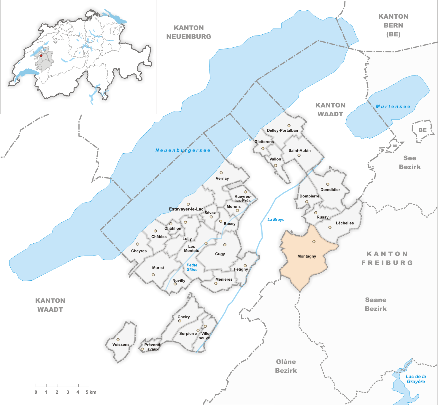 Municipality Montagny